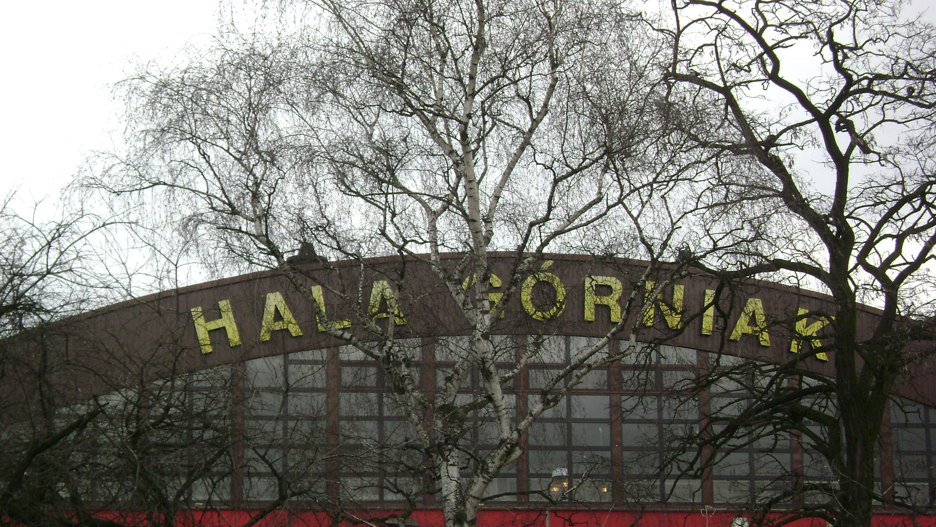 Napis na Hali Górniak przy pl. Niepodległości w Łodzi.